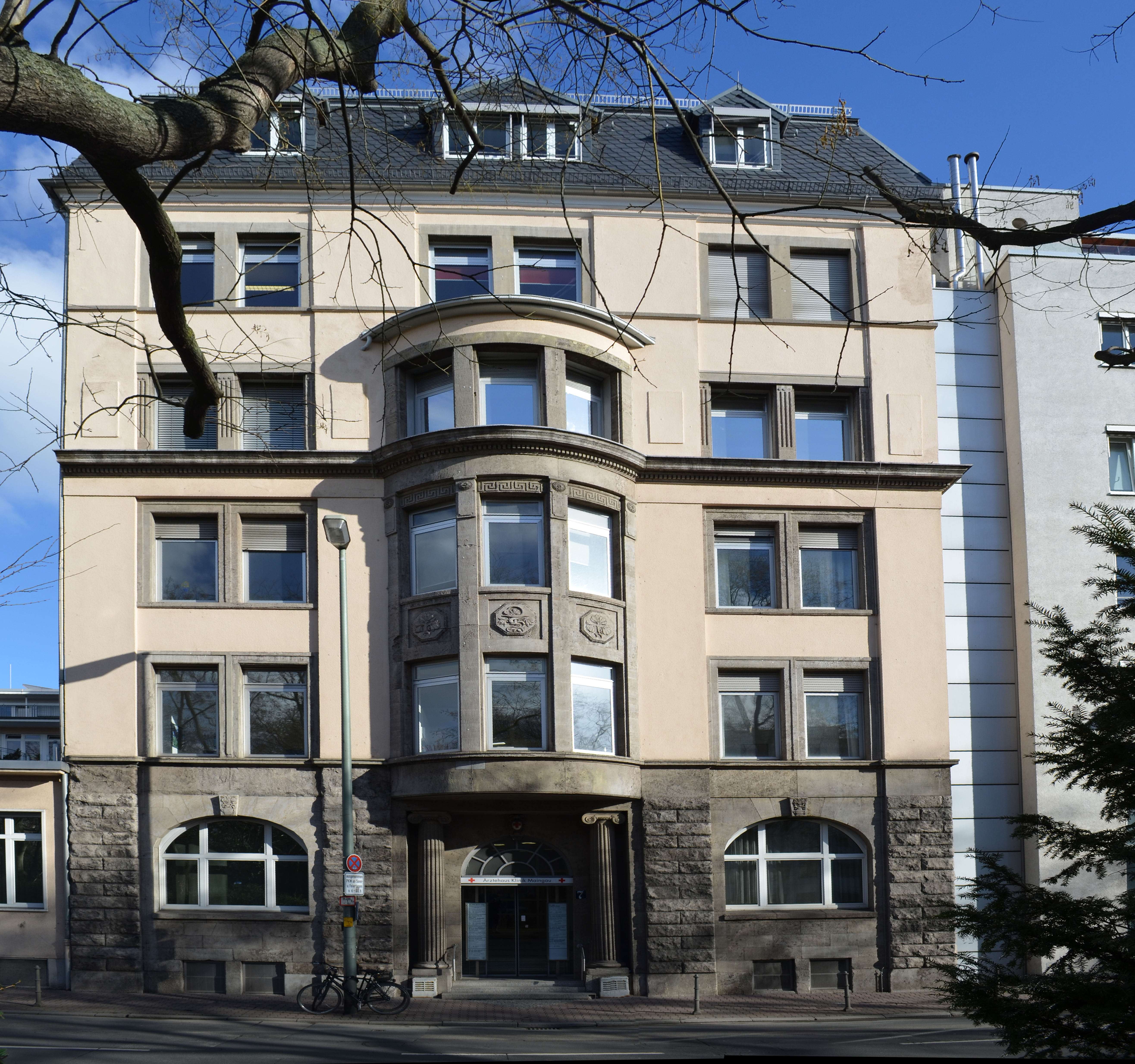 Frankfurt, Klinik Maingau, Ärztehaus